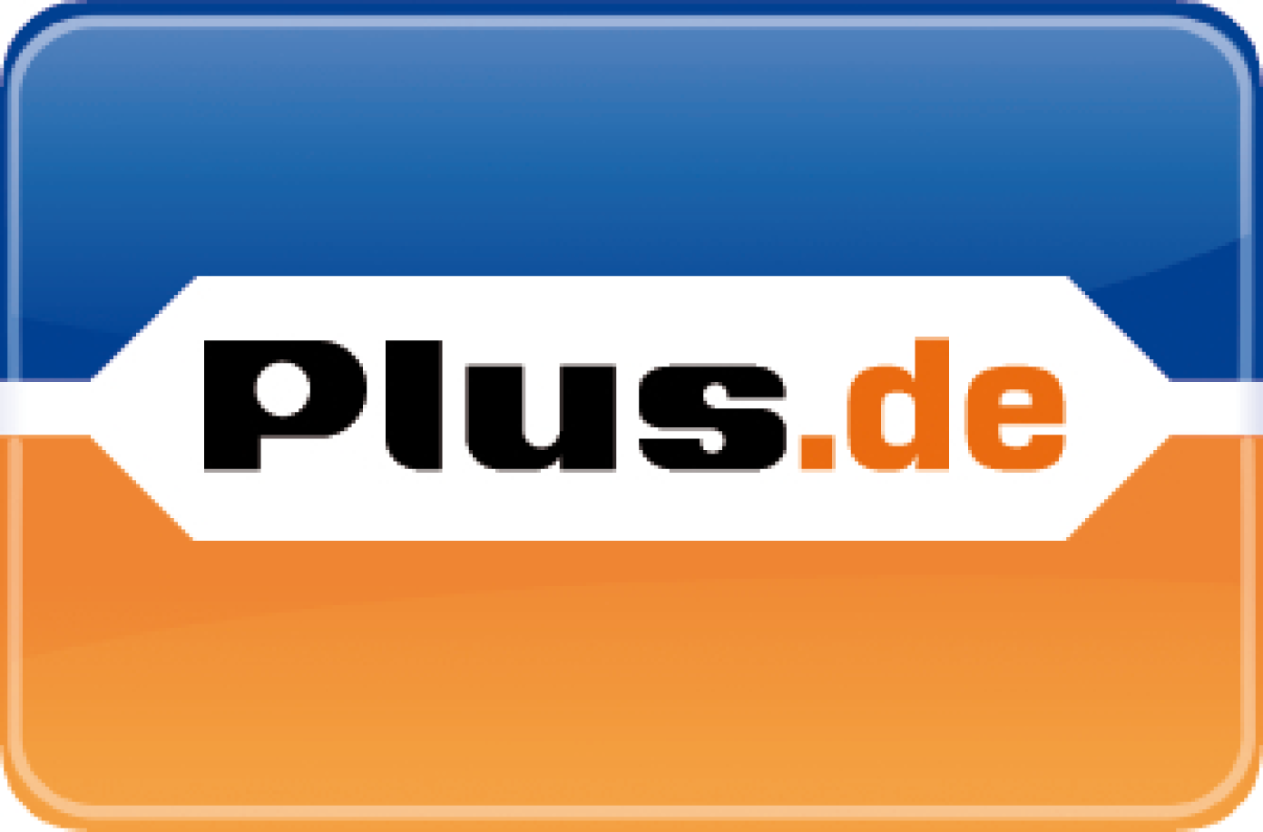 Logo von Plus.de